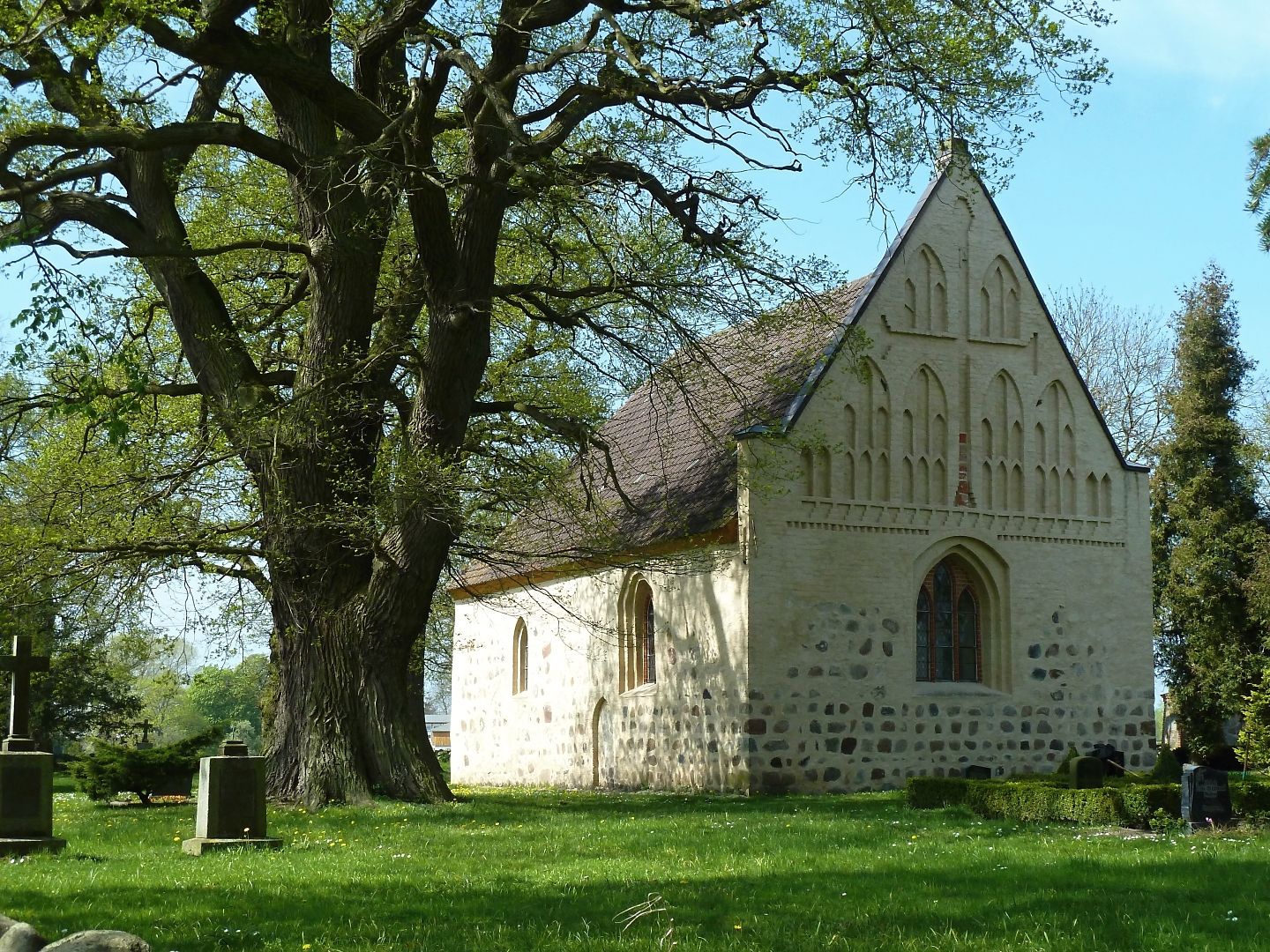 Dorfkirche in Medrow